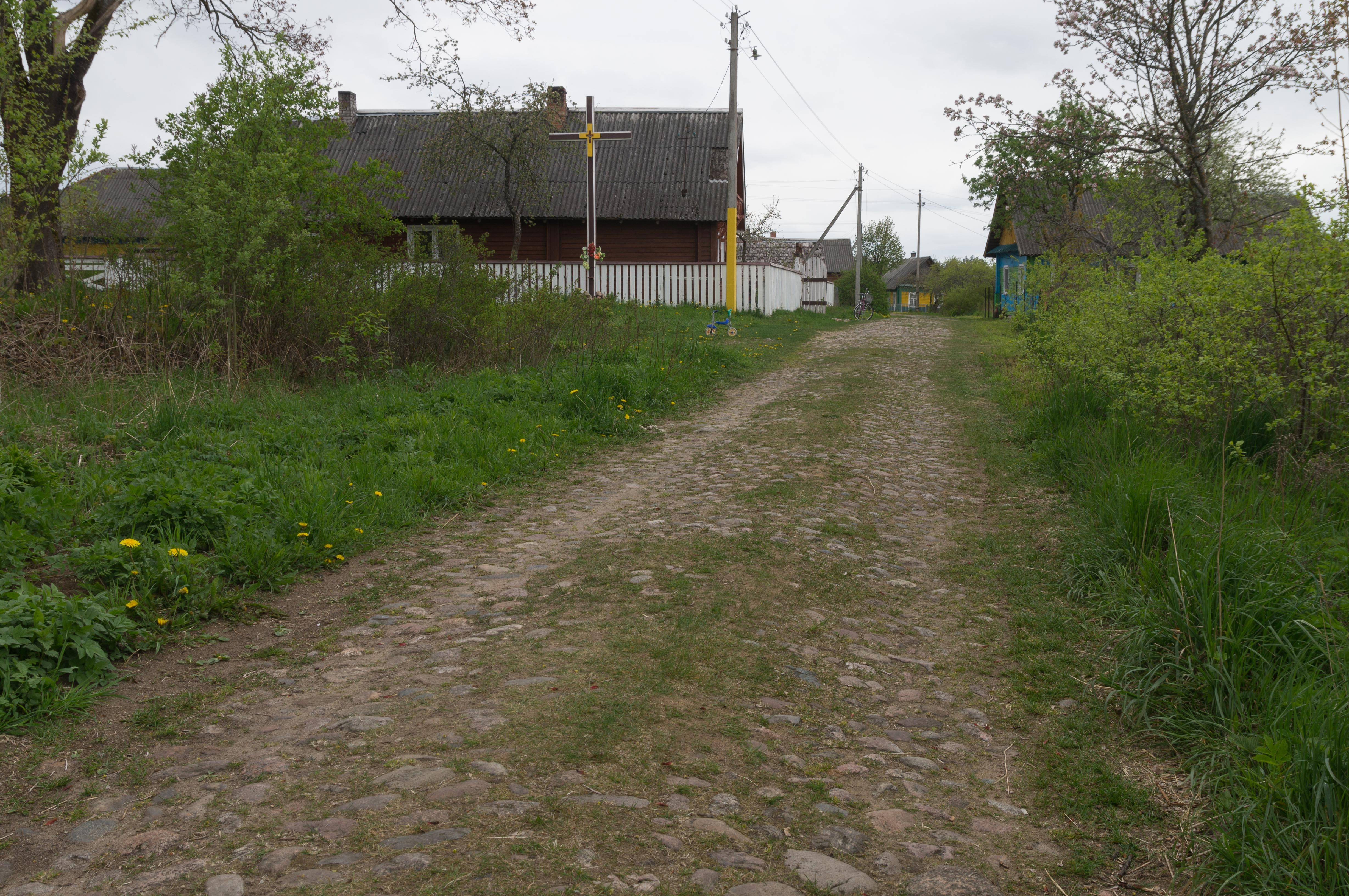 Брукаваная вуліца ў Сачыўках